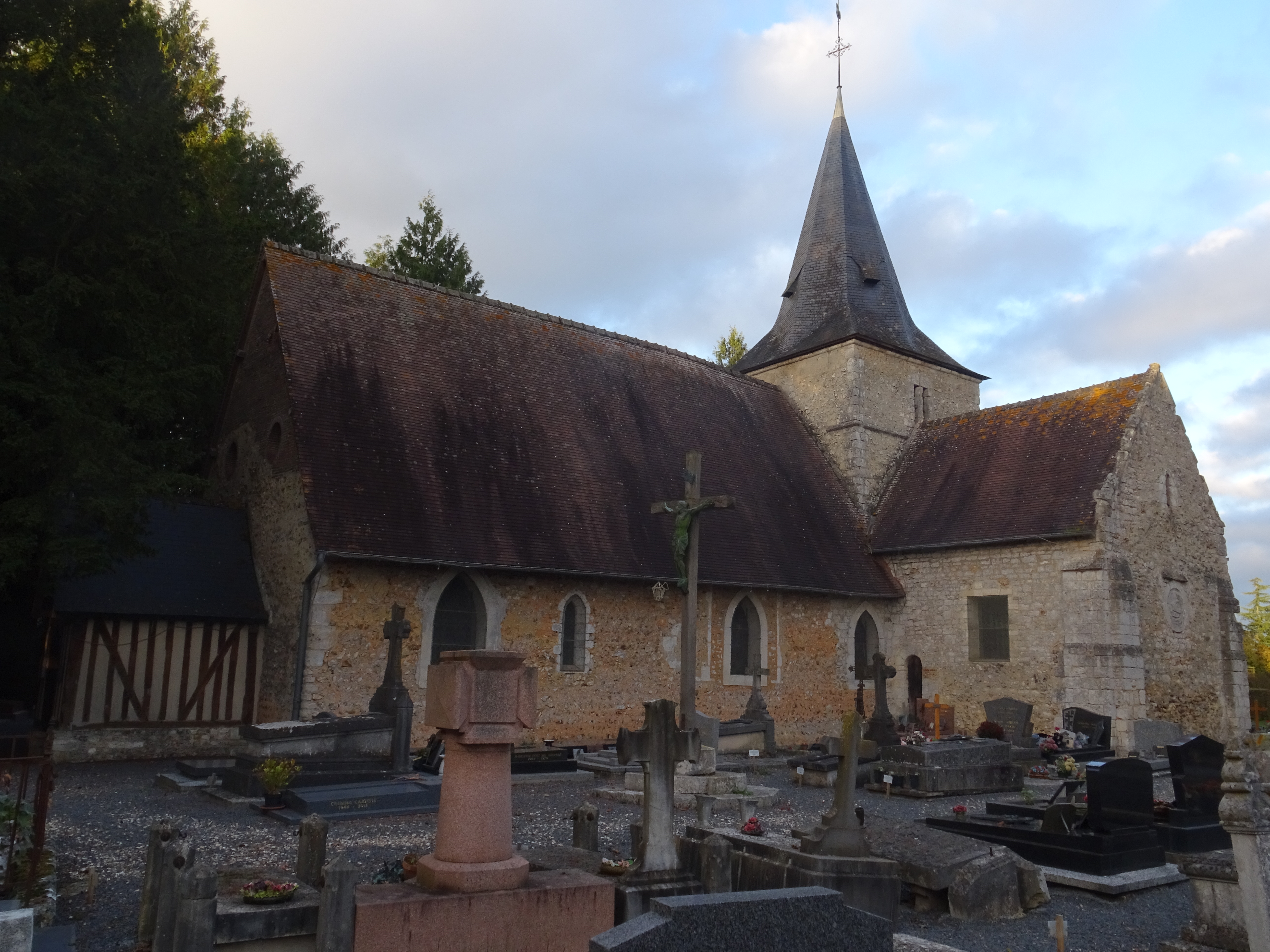 Eglise de Thierville (Eure - France)